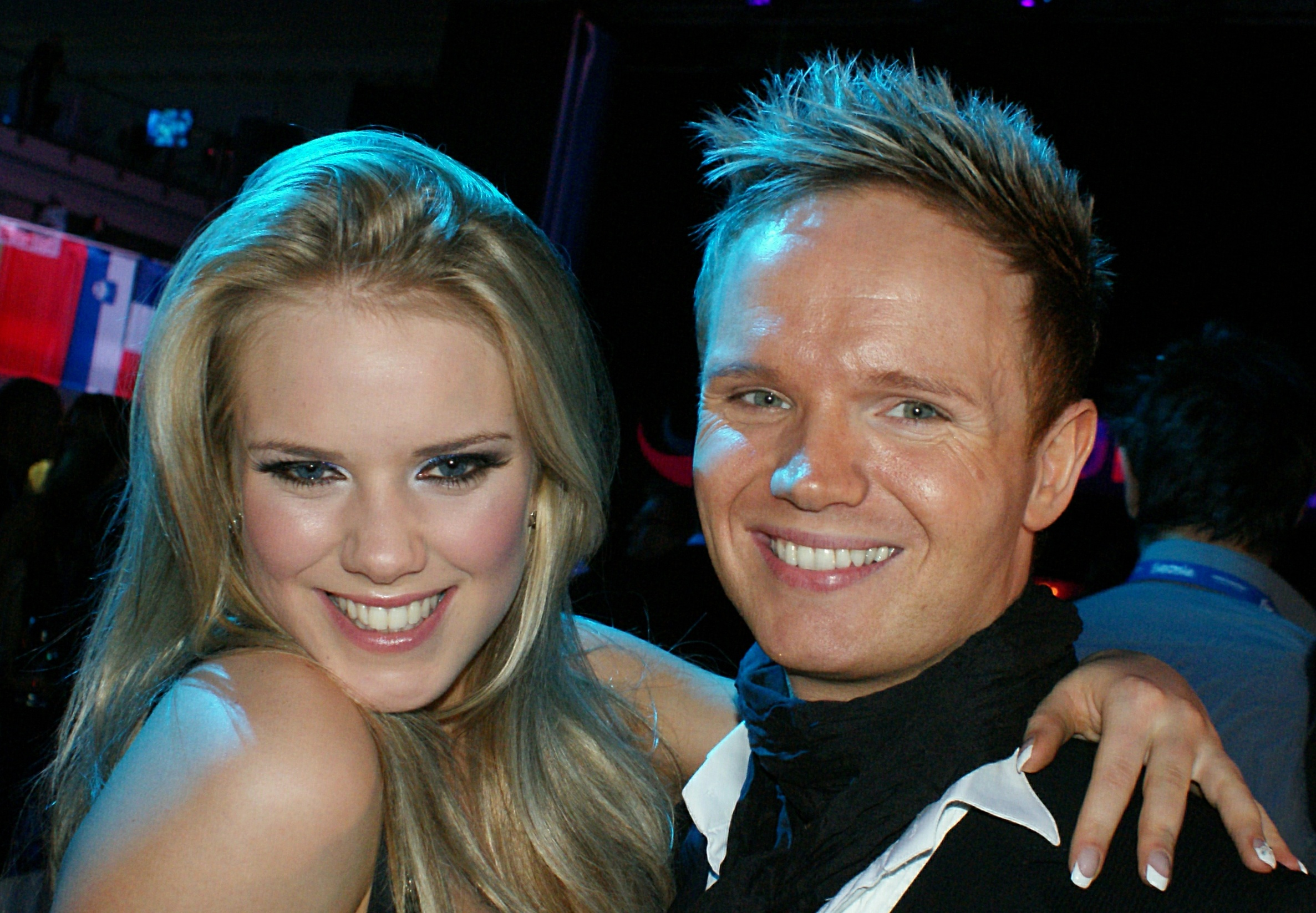 Jóhanna Guðrún Jónsdóttir & Friðrik Ómar in Moscow, 2009